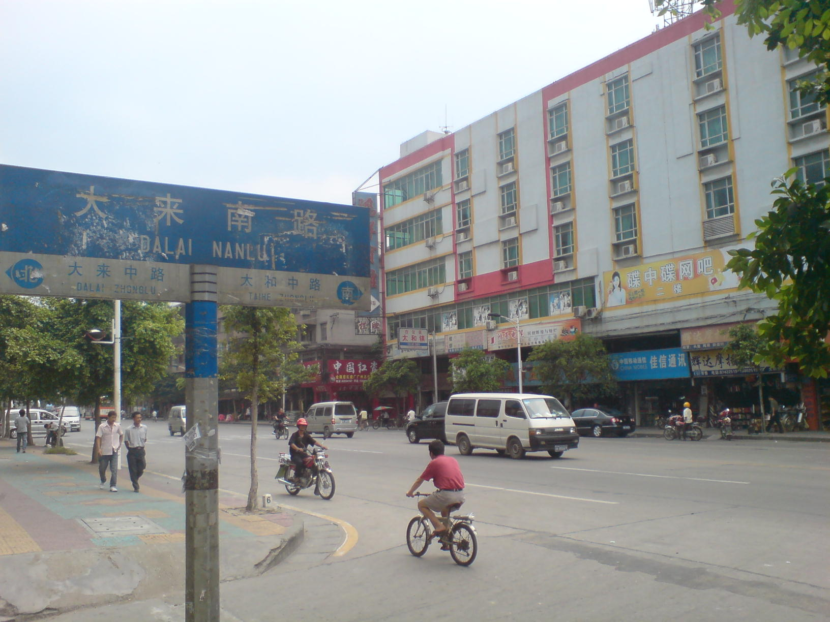 广州市白云区太和镇一景